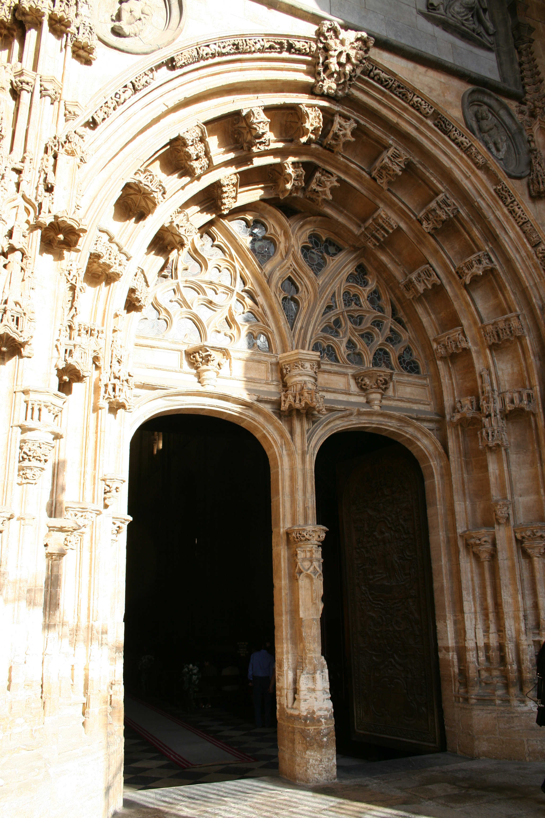 Pórtico principal de la Catedral de Oviedo